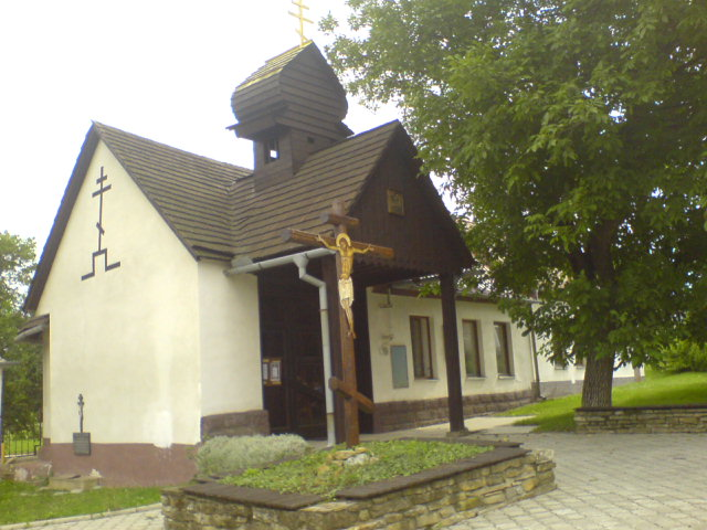 Pravoslavný monastýr v obci Hrubá Vrbka